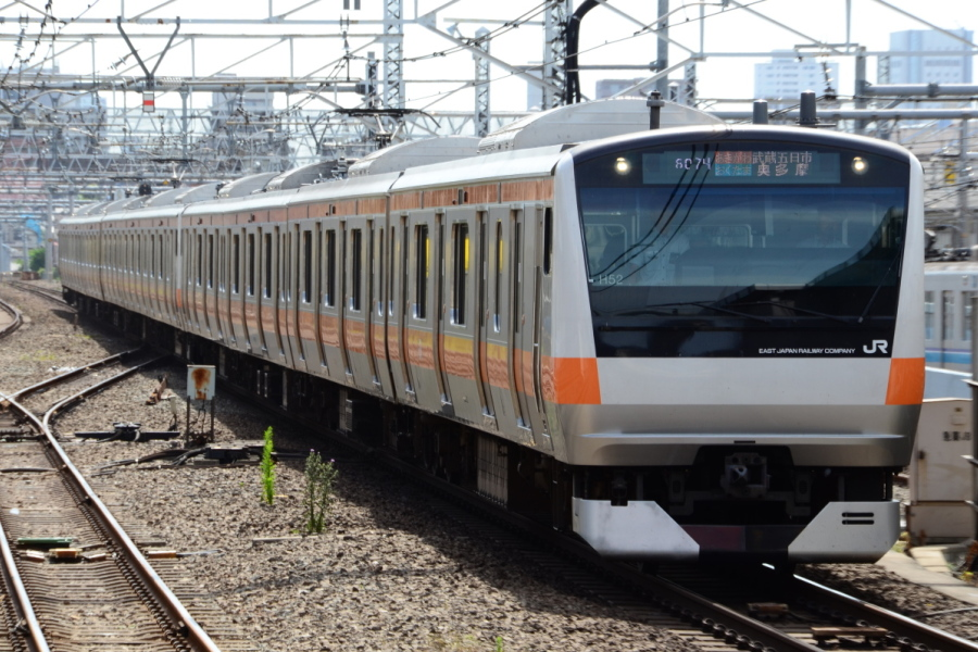 ホリデー快速おくたま・あきがわ号 中野駅にて